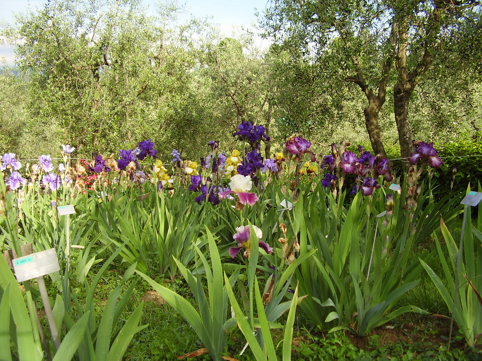 Alcune varietà di iris presso il "Giardino dell'iris" a Firenze, Italy